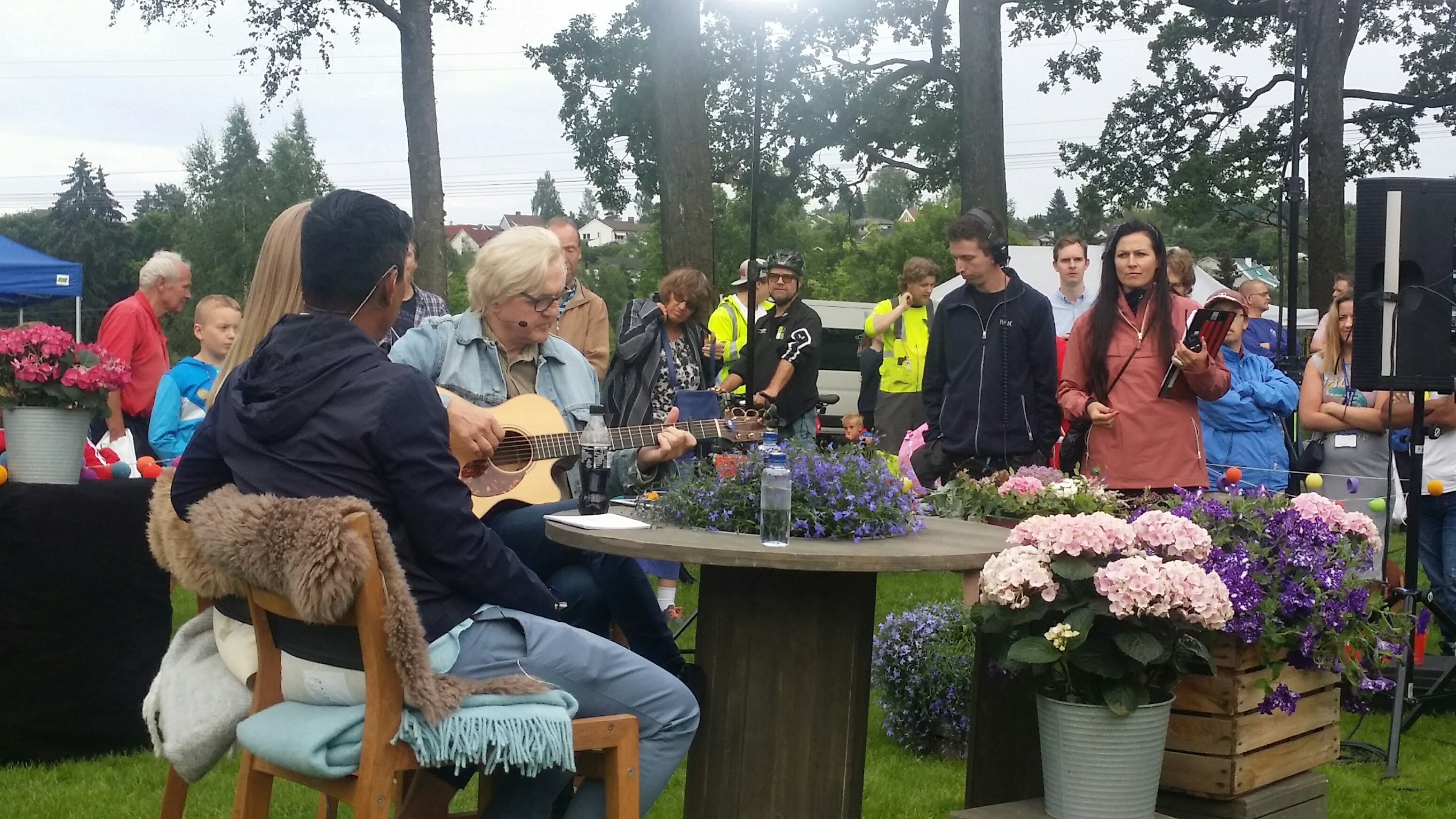 Grorud stasjon 21. juli 2017.